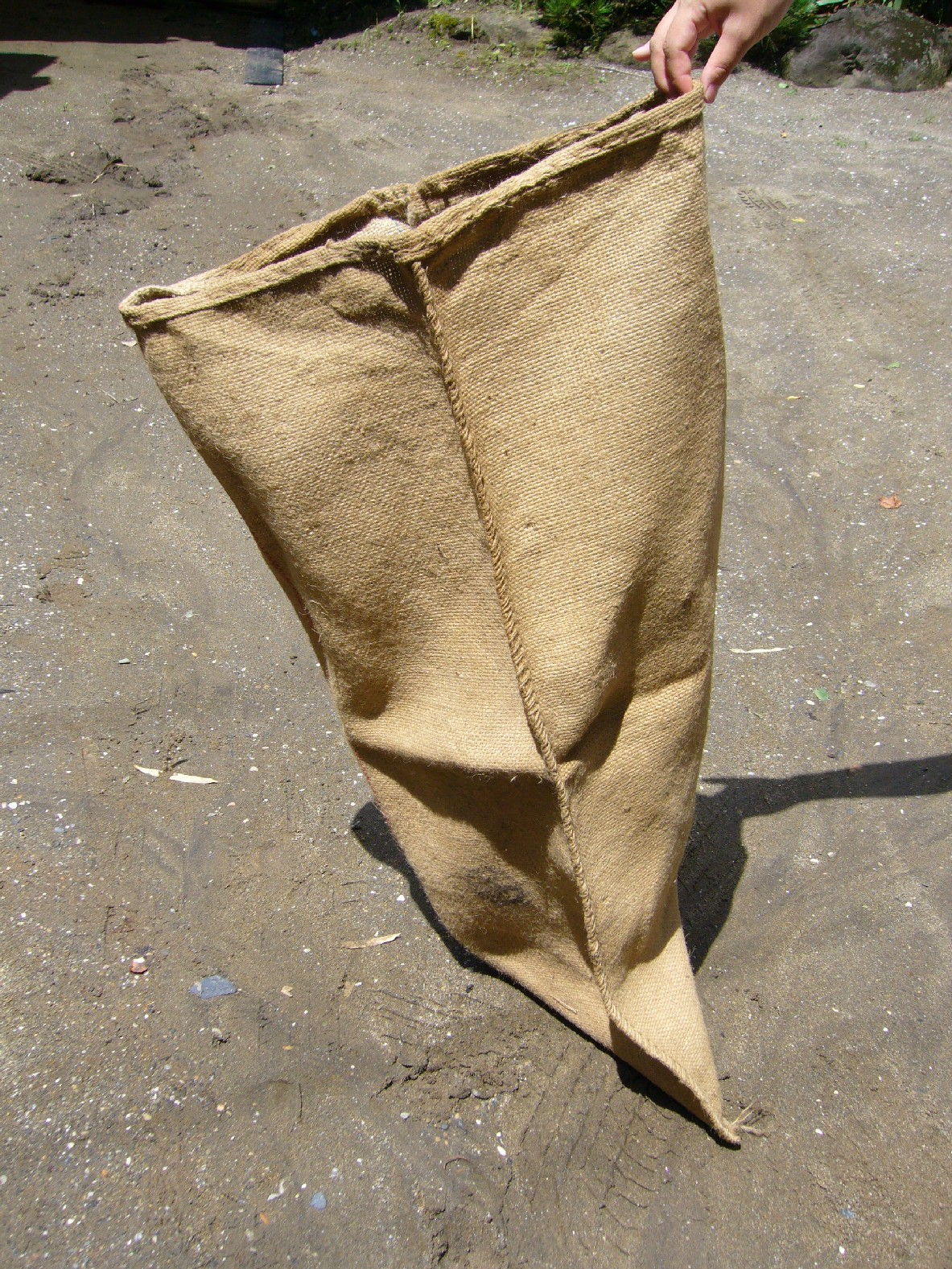 hemp-sack,asabukuro,japan